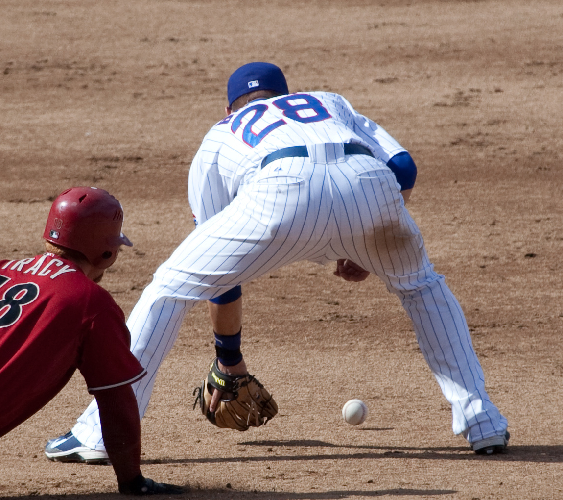 Jeff Baker